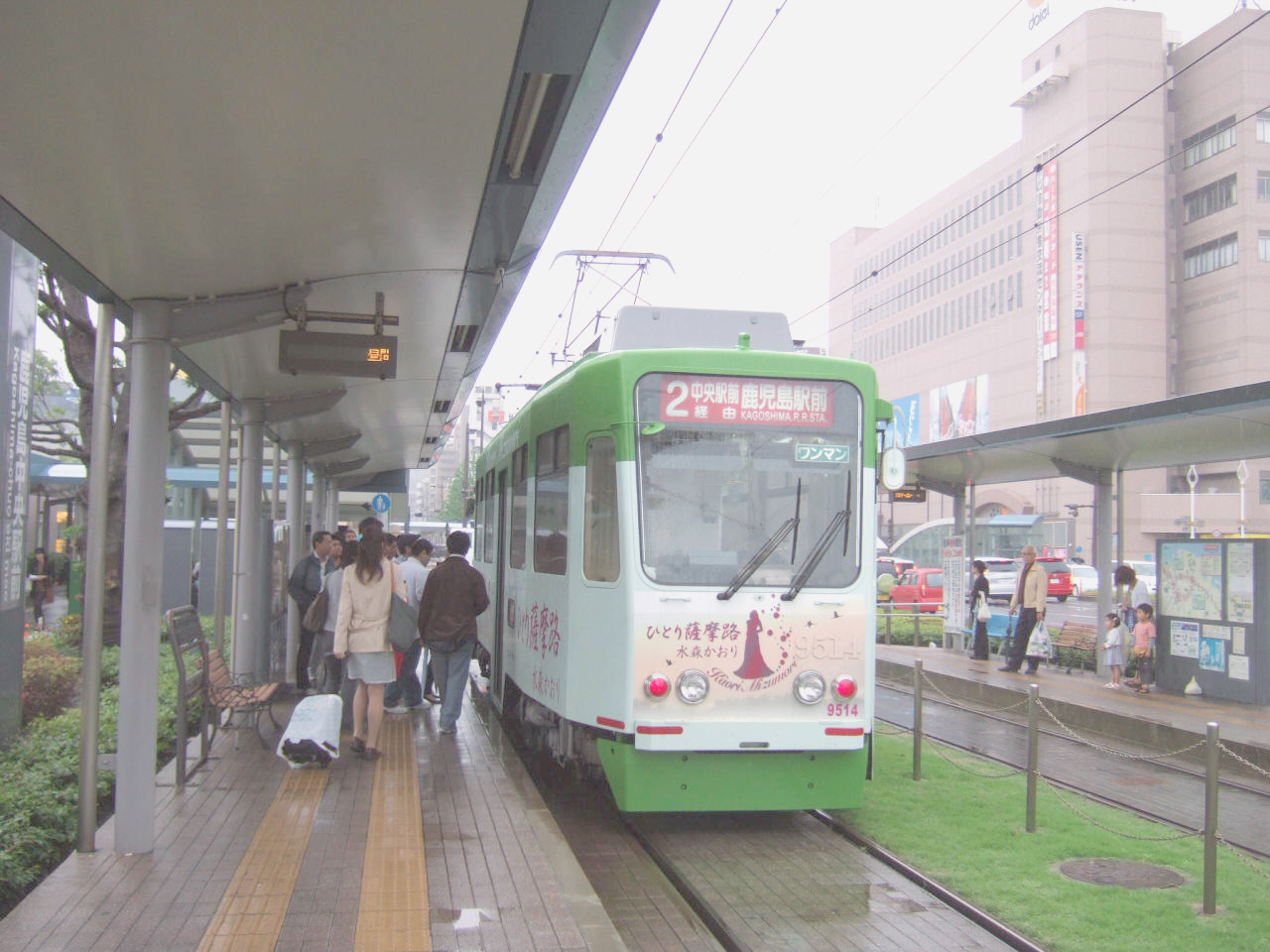 鹿児島市電 鹿児島中央駅前電停（Kagoshima City Tram Kagoshima-chuo-ekimae）